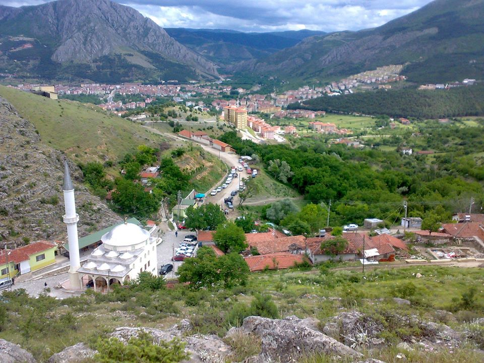 Yuvacık Köyü Genel Görünümü panorama.